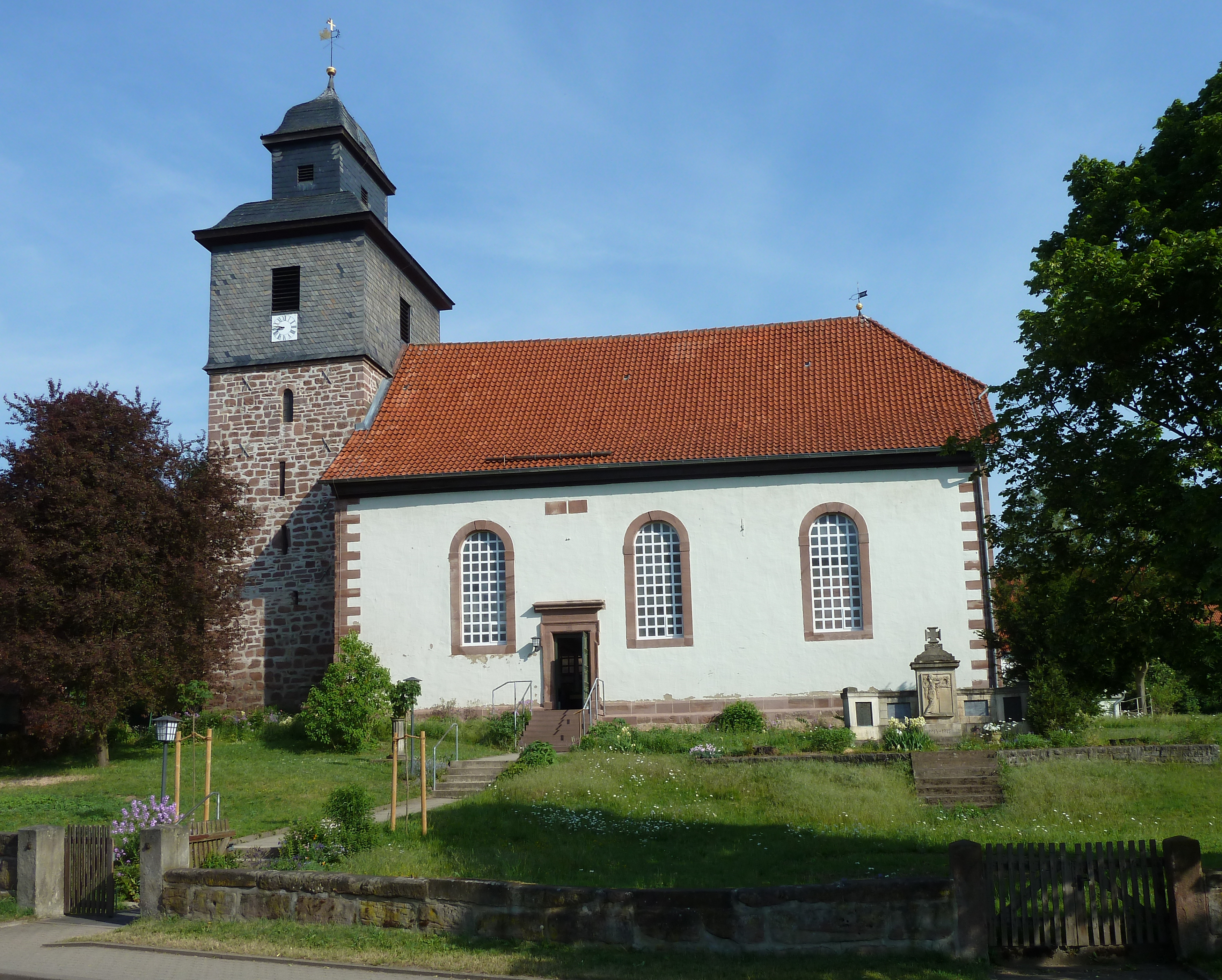 Ev.-luth. Kirche St. Michaelis in Diemarden, Gemeinde Gleichen, Landkreis Göttingen. Mittelalterlicher Westturm mit Aufsatz aus der 2. Hälfte des 18. Jahrhunderts, Saalkirche von 1733, innen fertiggestellt 1774